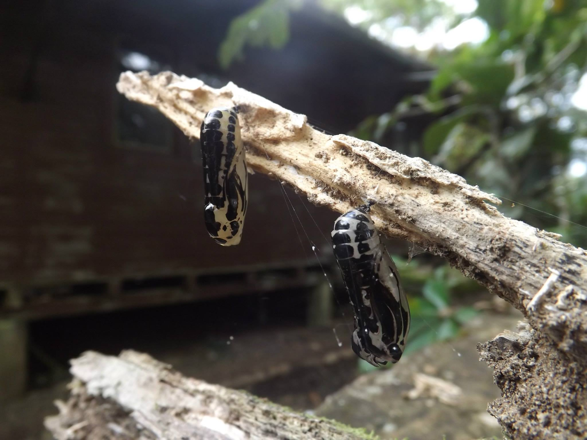 cocons